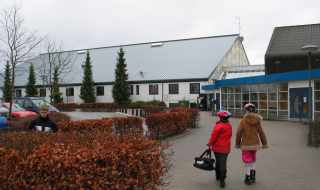 Værløsehallen.